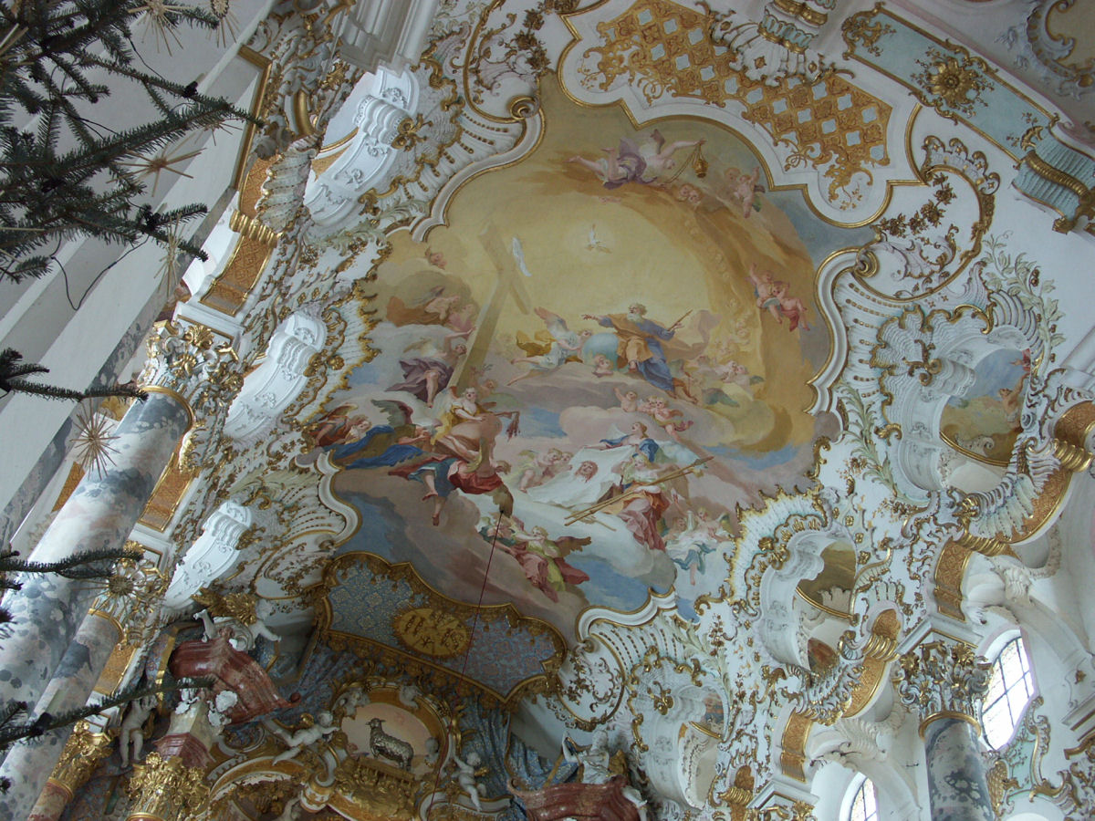 Wies church (Wieskirche), Germany